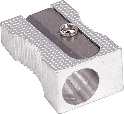 sacapuntas metalico